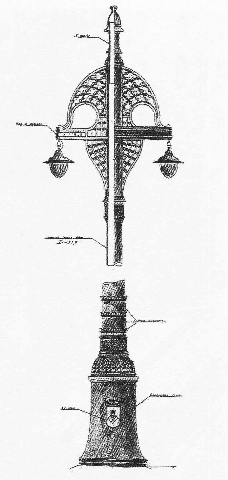 Ritning till Norrmalmstorgs belysningsstolpar